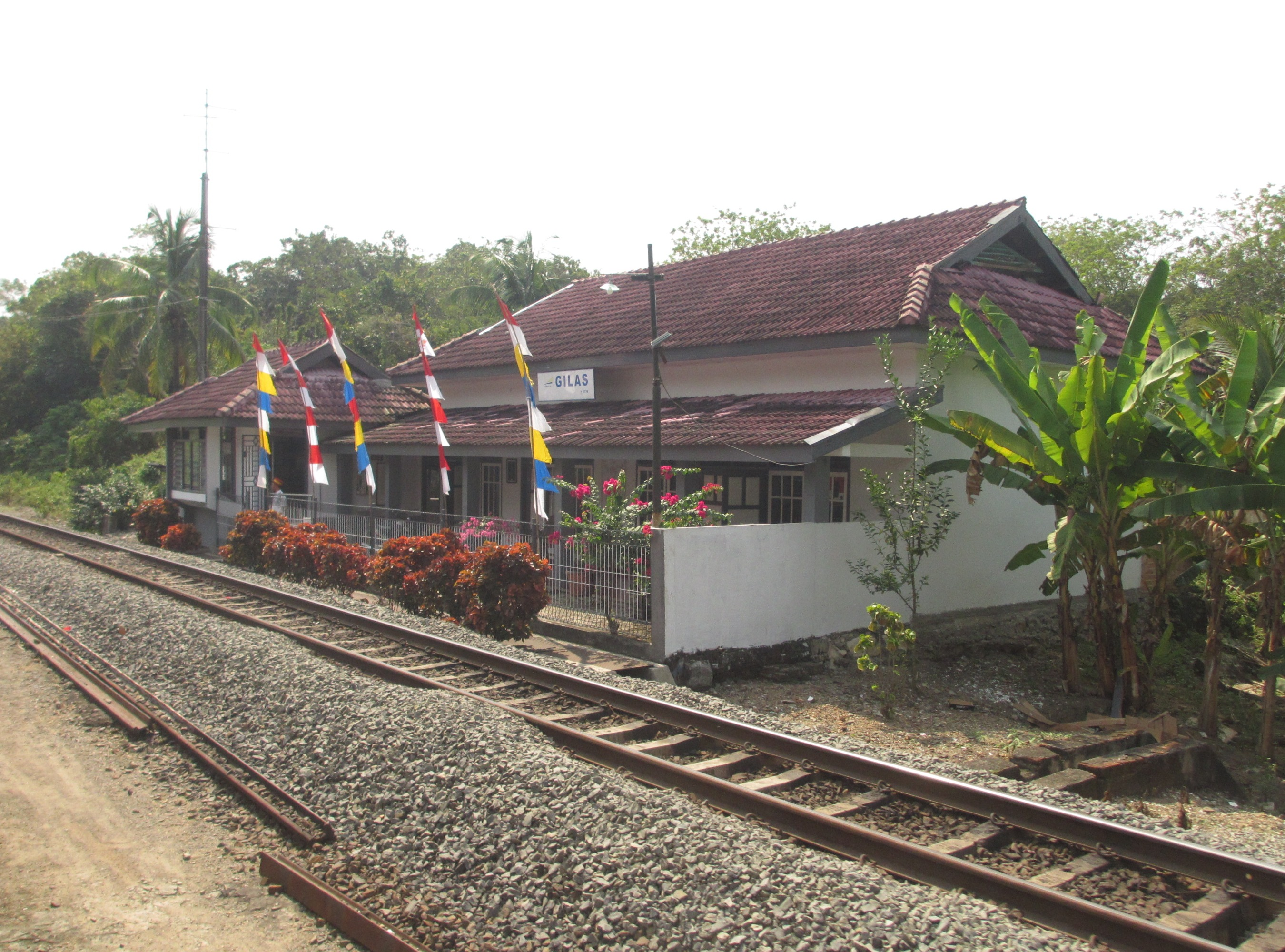 Stasiun Gilas.